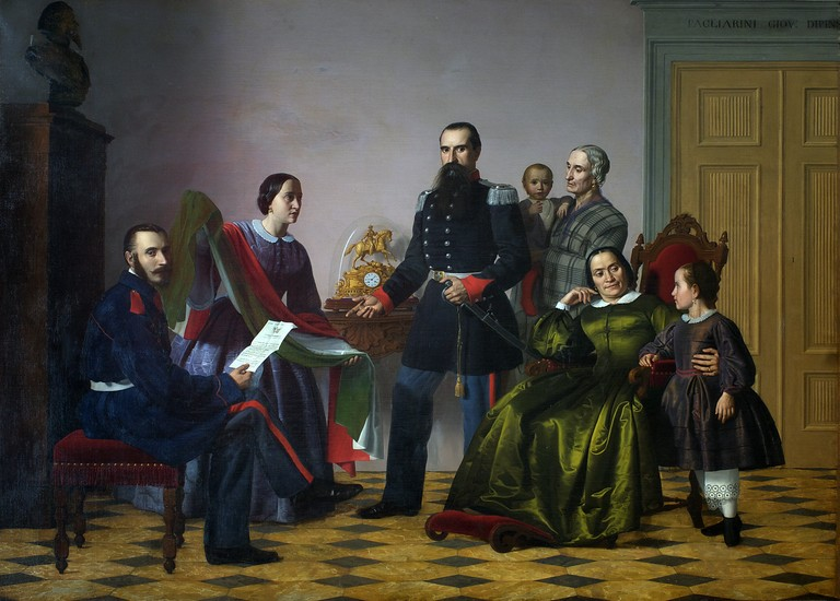 Giovanni Pagliarini, La famiglia del Plebiscito, 1860 (Museo dell'Ottocento presso le Gallerie d’Arte Moderna e Contemporanea, Ferrara)